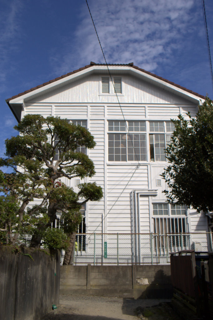 酒泉館 Shusenkan cafe